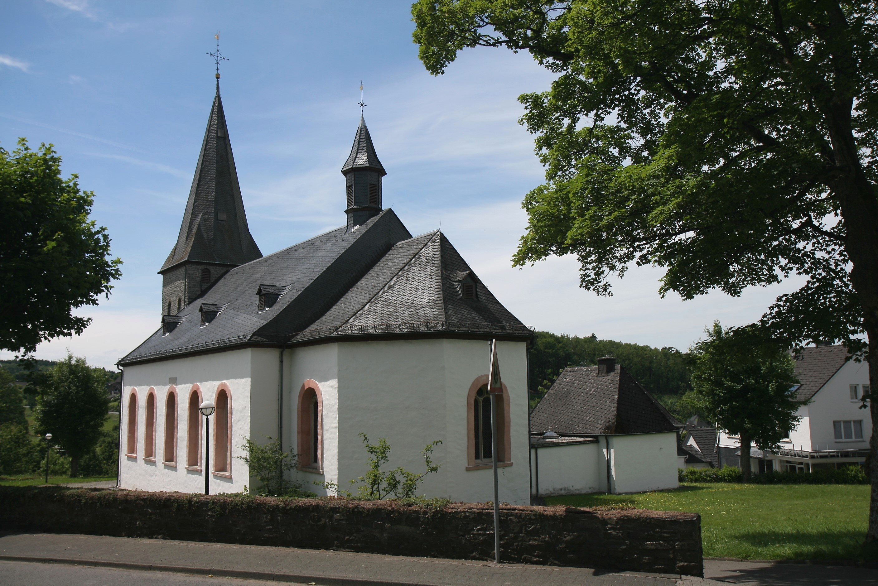 Katholische Kirche Sankt Cyriakus in Olpe-Rhode. Baudenkmal seit 12. April 1989.